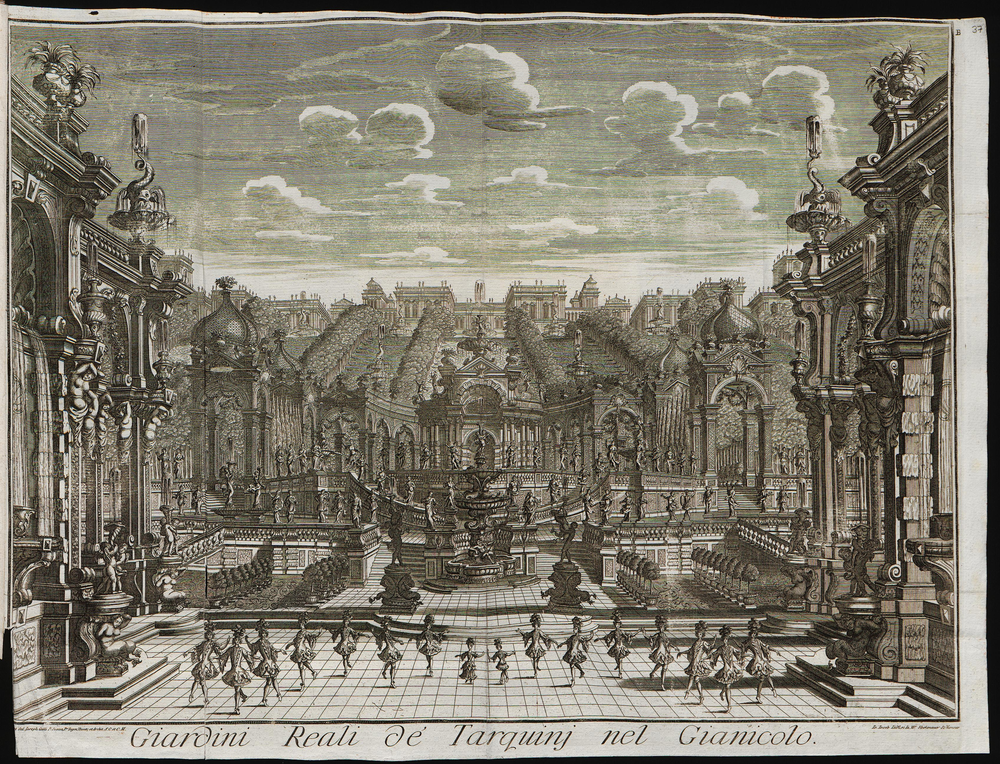 Grafik aus dem Klebeband Nr. 15 der Fürstlich Waldeckschen Hofbibliothek Arolsen Costanza e fortezza, Oper von Johann Joseph Fux (Musik), Pietro Pariato (Libretto), uraufgeführt 28. August 1723 in Prag zur Krönung Karl VI. zum König von Böhmen. Theaterarchitektur und Bühnenbilder von Giuseppe Galli da Bibiena. Motiv: "Giardini Reali de' Tarquinj nel Gianicolo" Bühnenbild: Die königlichen Gärten der Tarquinier auf dem Gianicolo